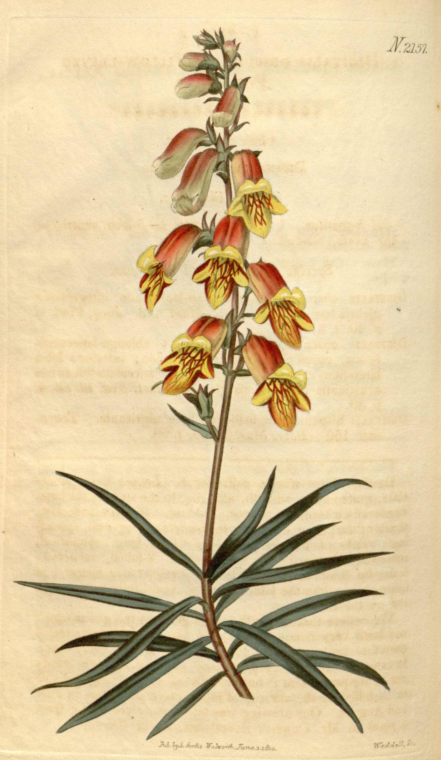 Digitalis obscura subsp. obscura